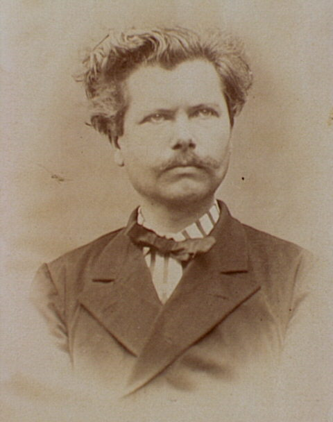 Charles Lullier (1838-1891)